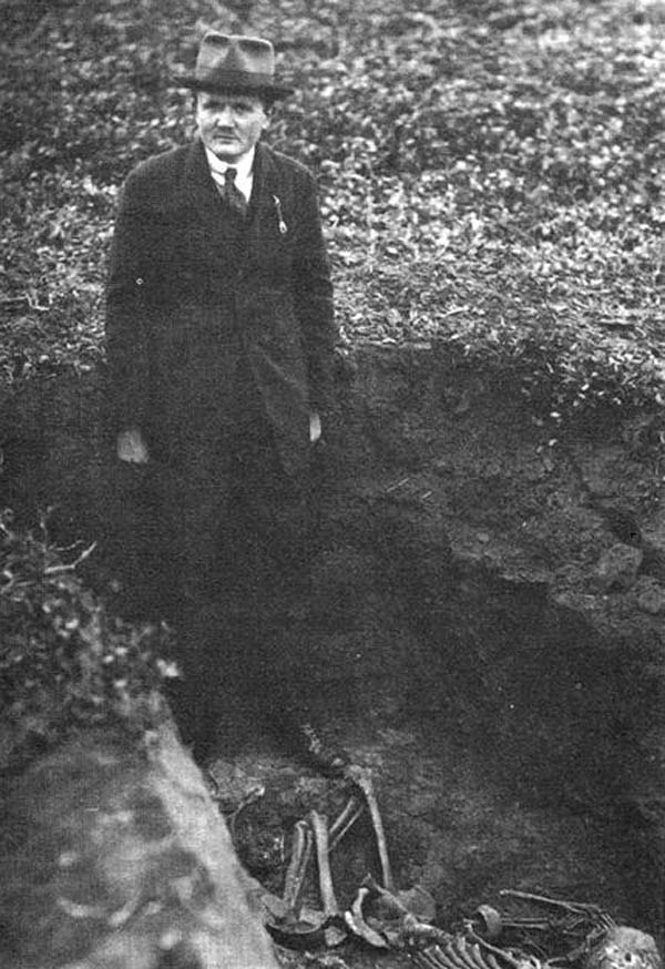 Archeolog MUDr. František Dvořák (1896-1943) v roce 1925